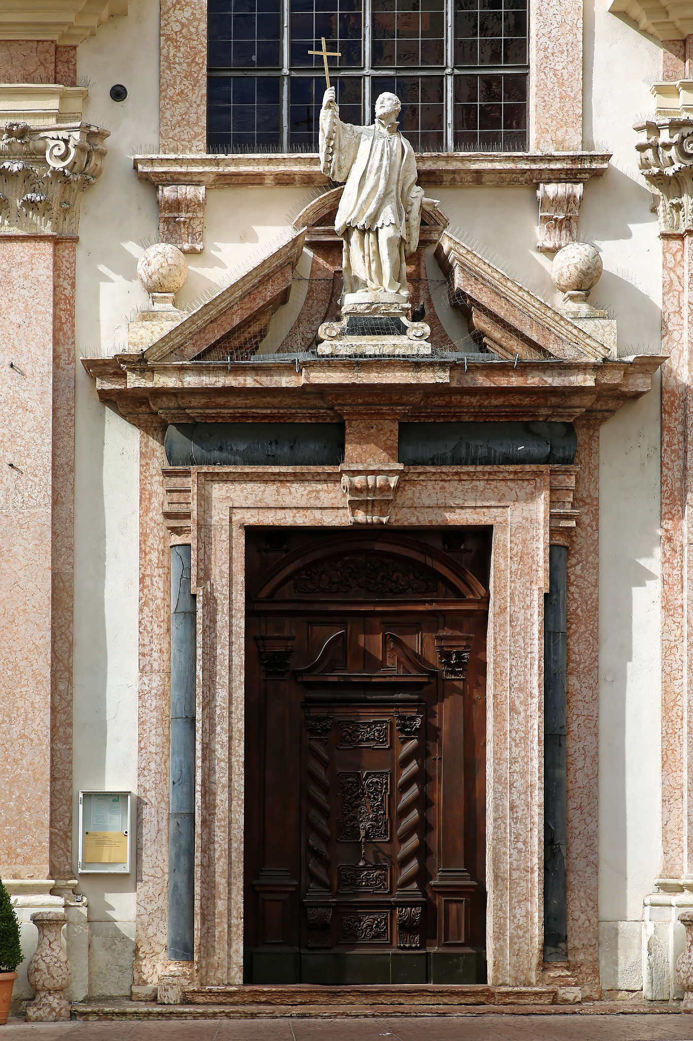 Eingangsportal, darüber Statue von San Francesco Saverio